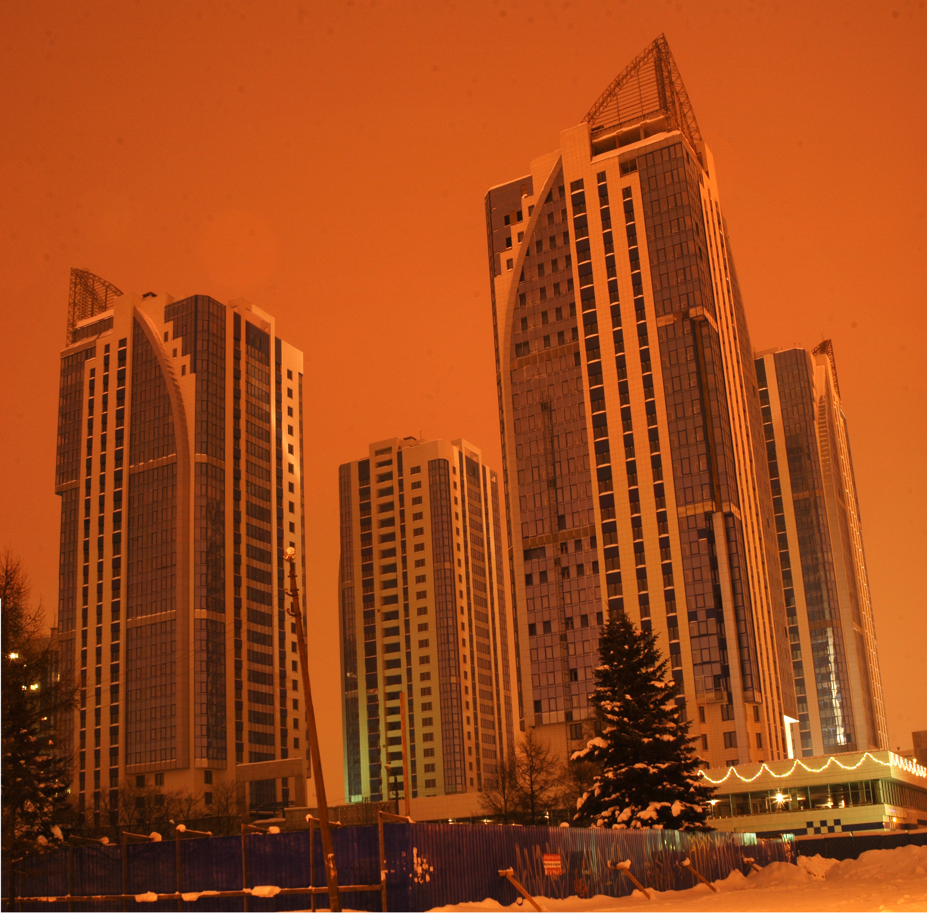 Moskovsky District, St Petersburg, Russia